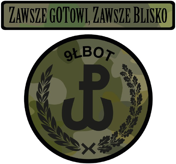 9 Łódzka Brygada Obrony Terytorialnej – oznaka rozpoznawcza na mundur polowy – 2019, Polska.